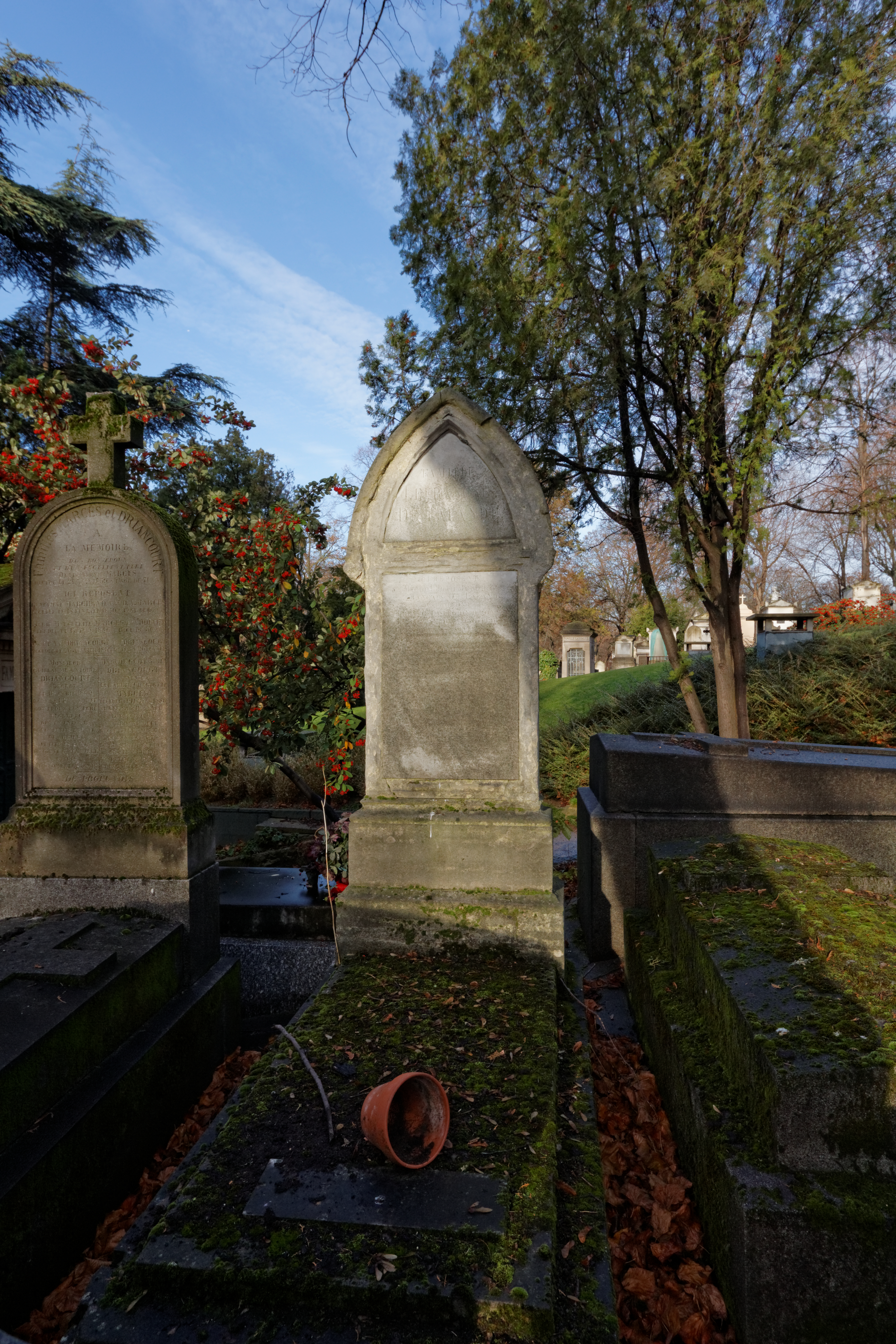 Vue d'ensemble